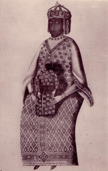 Gravure de la Vierge Noire Notre-Dame du Puy-en-Velay (Haute-Loire) avant sa destruction